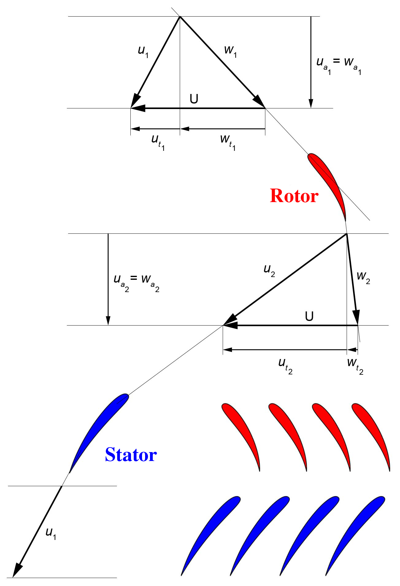 Diagramme des vitesses d'un étage compresseur + Traduction.